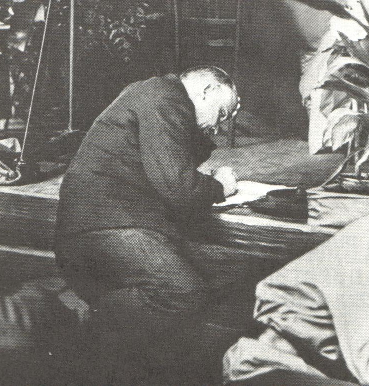 Lenin in einer Sitzung des III. Kongresses der Komintern in Moskau. 22. Juni bis 12. Juli 1921